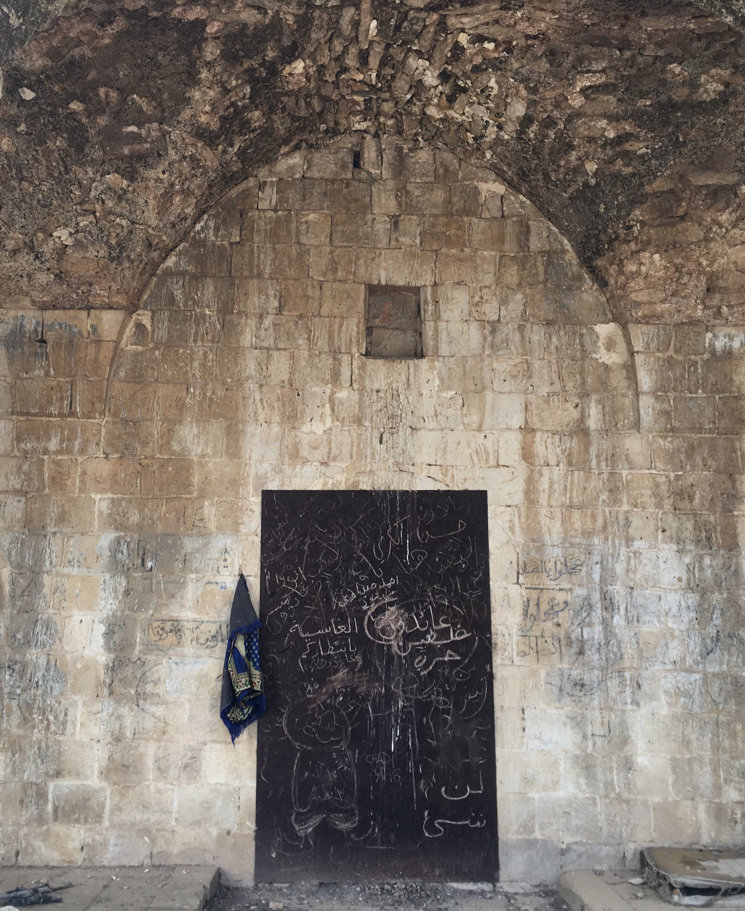 مسجد قرية الغابسيّة المهجّرة- فلسطين